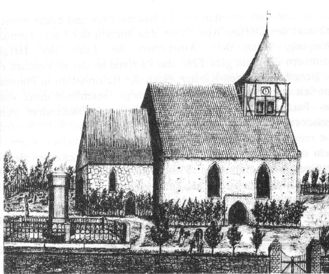 Kartlow - Landkreis Demmin - St. Johannis-Kirche um 1852